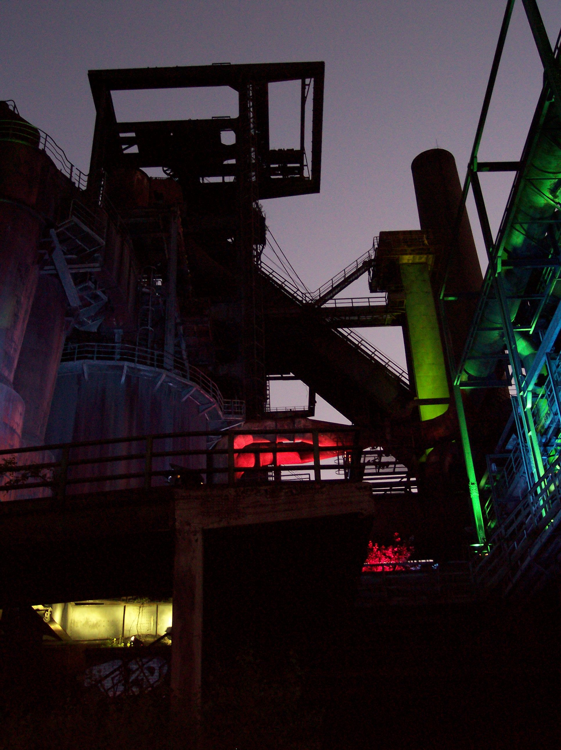 Hörder Bergwerks- und Hütten-Verein, stillgelegte Hochofenanlage Phoenix-West in Dortmund, ExtraSchicht 2006